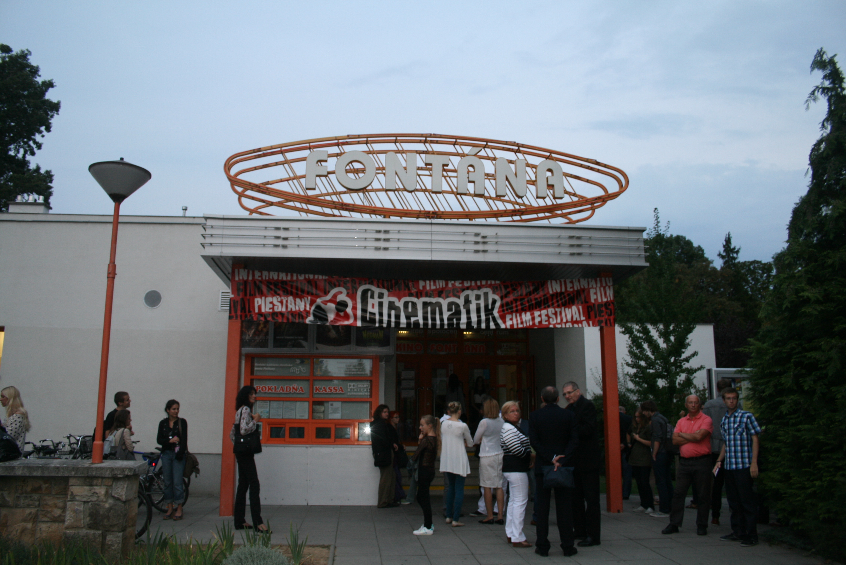 Kino Fontána v Piešťanoch počas festivalu Cinematik 2012.